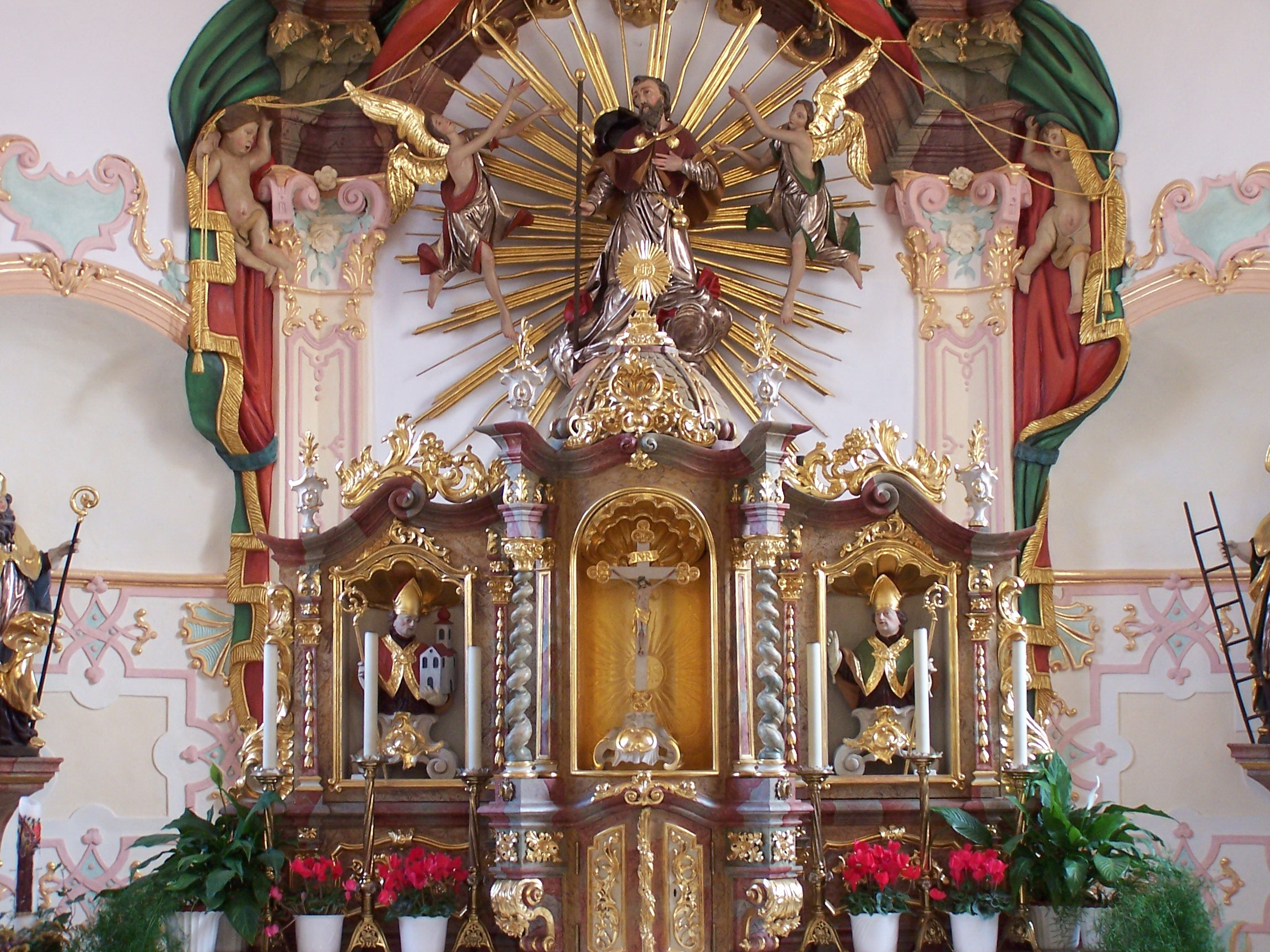 Langquaid Marktplatz 14. Katholische Pfarrkirche St. Jakob d. Ä. Saalkirche mit Steildach, eingezogenem Rechteckchor und Chorscheitelturm, Portalvorhalle nach Süden, Chor und Turm im Kern romanisch, 13. Jahrhundert, Langhaus spätgotisch, 15. Jahrhundert, Barockisierung der Anlage um 1740, Verlängerungen nach Westen, 1917 und 2004; mit Ausstattung; Seelenkapelle, rechteckiger Satteldachbau, 18. Jahrhundert. Tabernakel mit zwei gewundenen Säulen und geschweiftem Gebälk. Seitlich Holzbüsten St. Valentin und St. Wolfgang auf Sockeln.